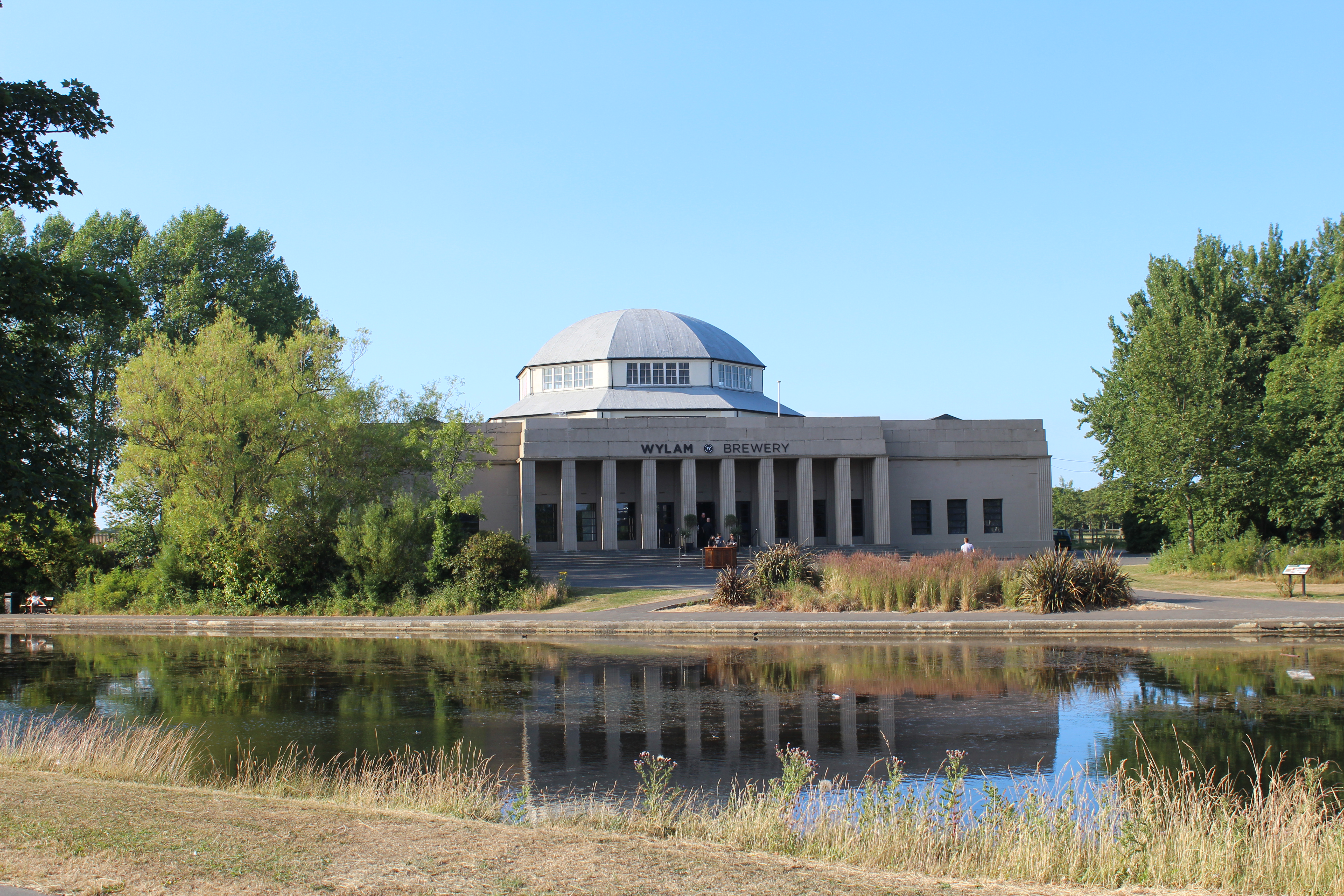 Brasserie Wylam, ancien palais des Arts, Newcastle upon Tyne.